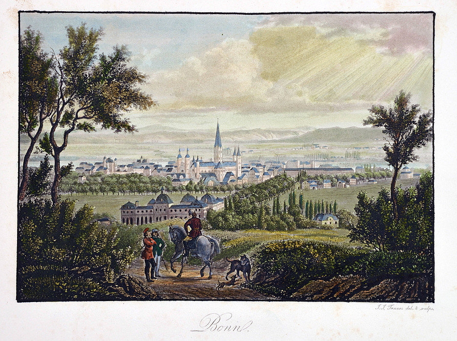 Bonn, aus: J. J. Tanner: Andenken an den Rhein, Zabern, Mainz ca. 1860